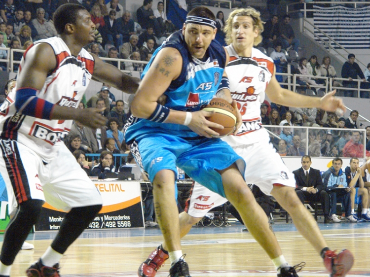 Peñarol's Center Román González penetrating during a game